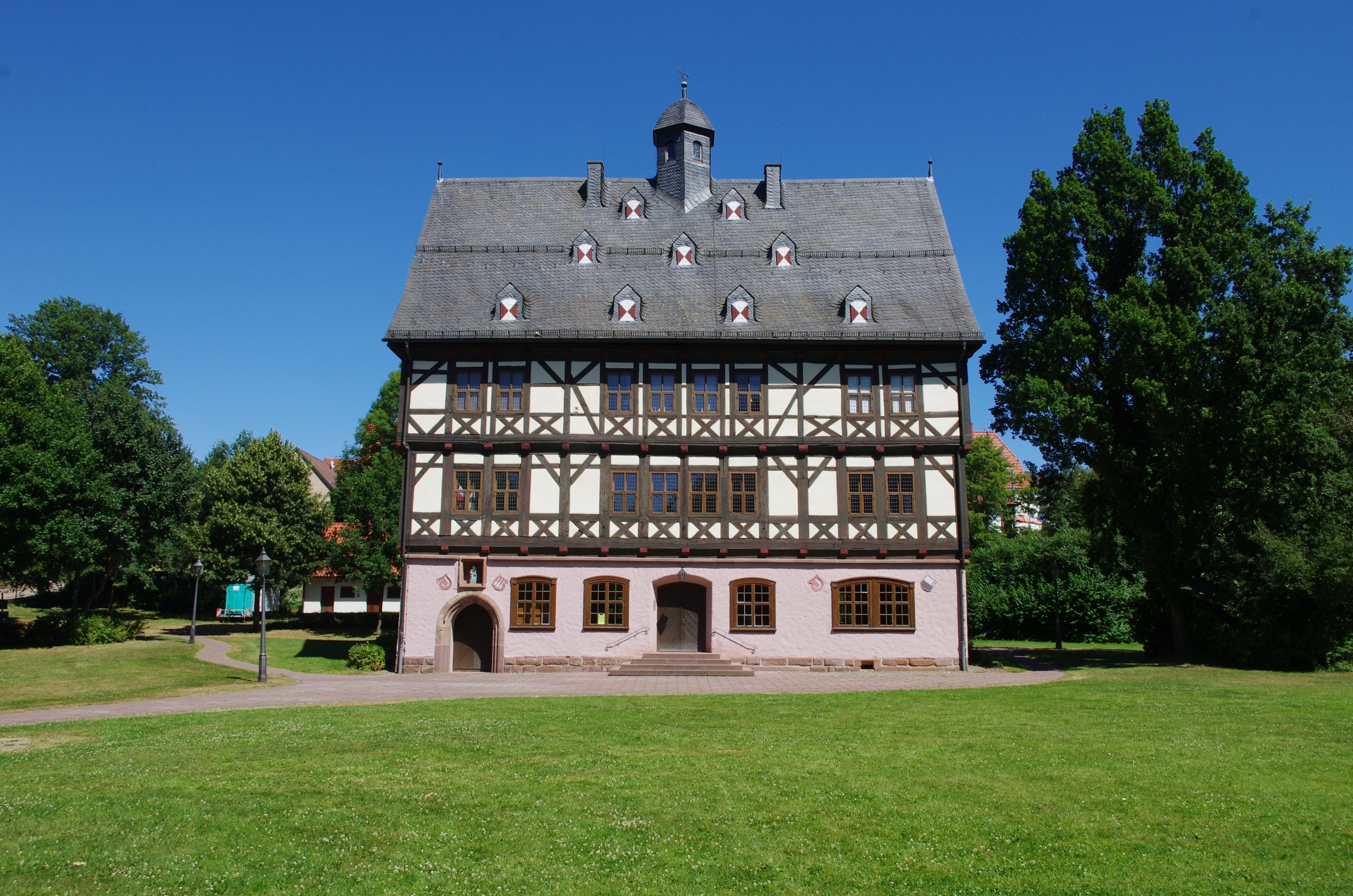 Gieboldehausen in Niedersachsen. Das Haus Schloss steht unter Denkmalschutz.